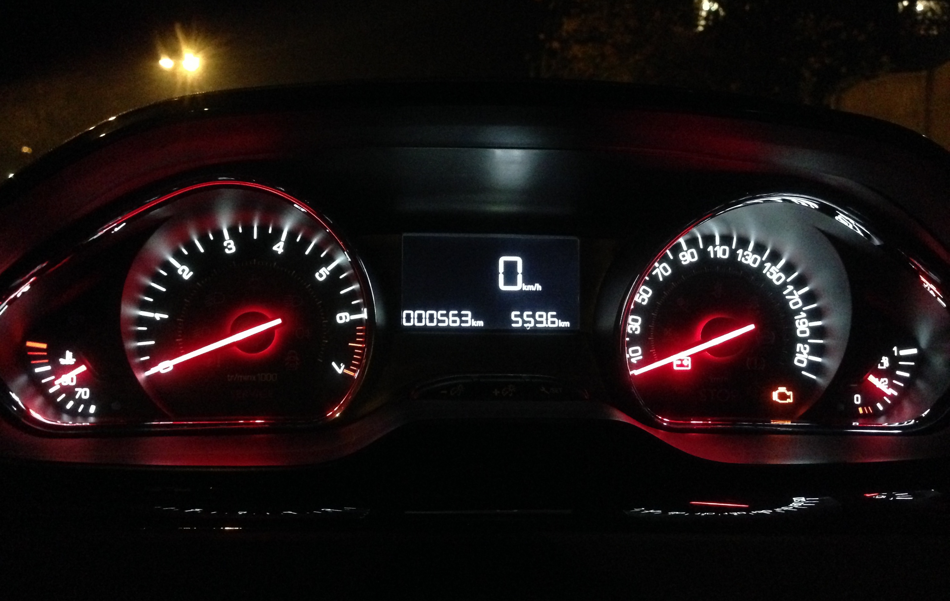 Cockpit des neuen Peugeot 208